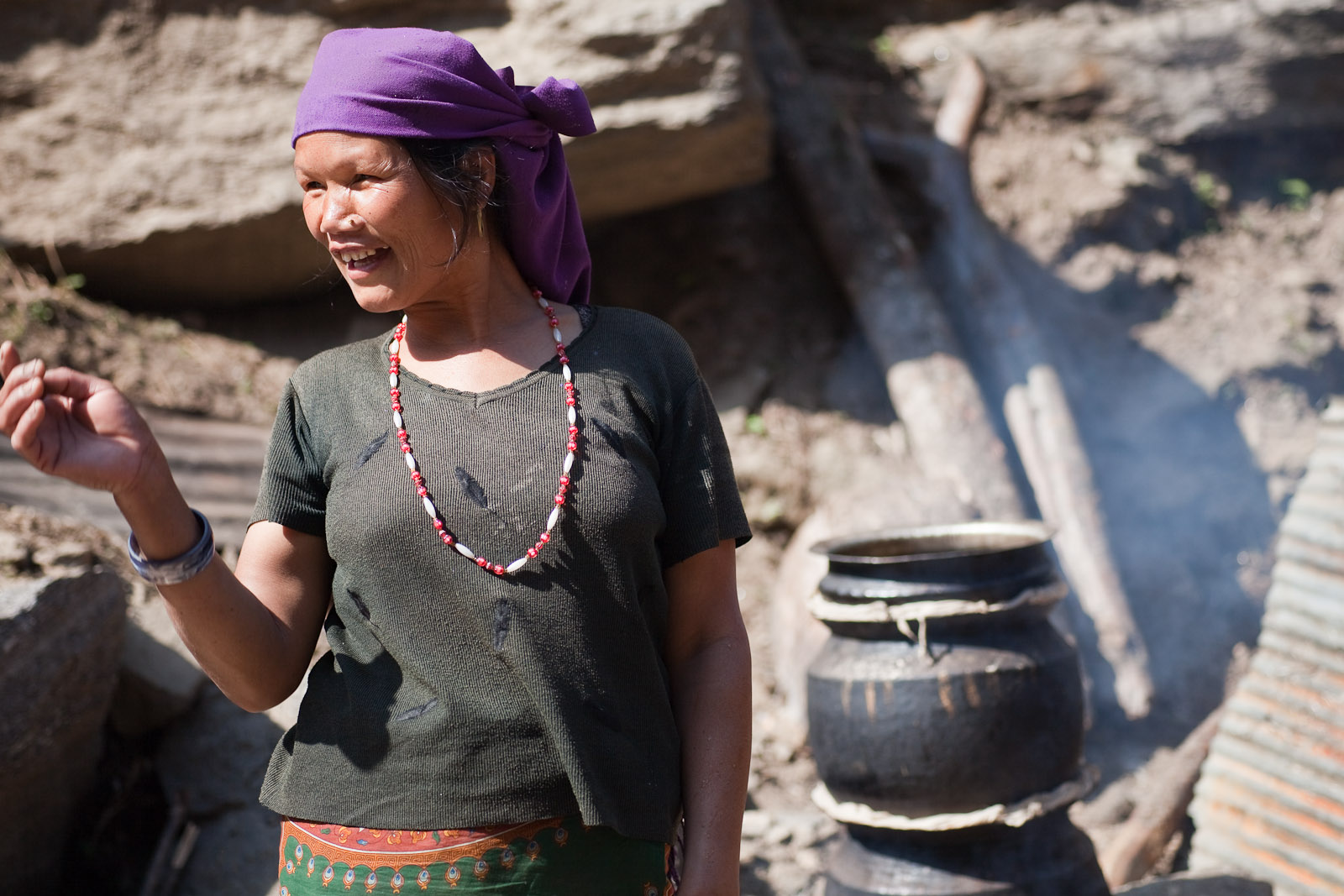 Woman brewing raksi (Nepali whisky)